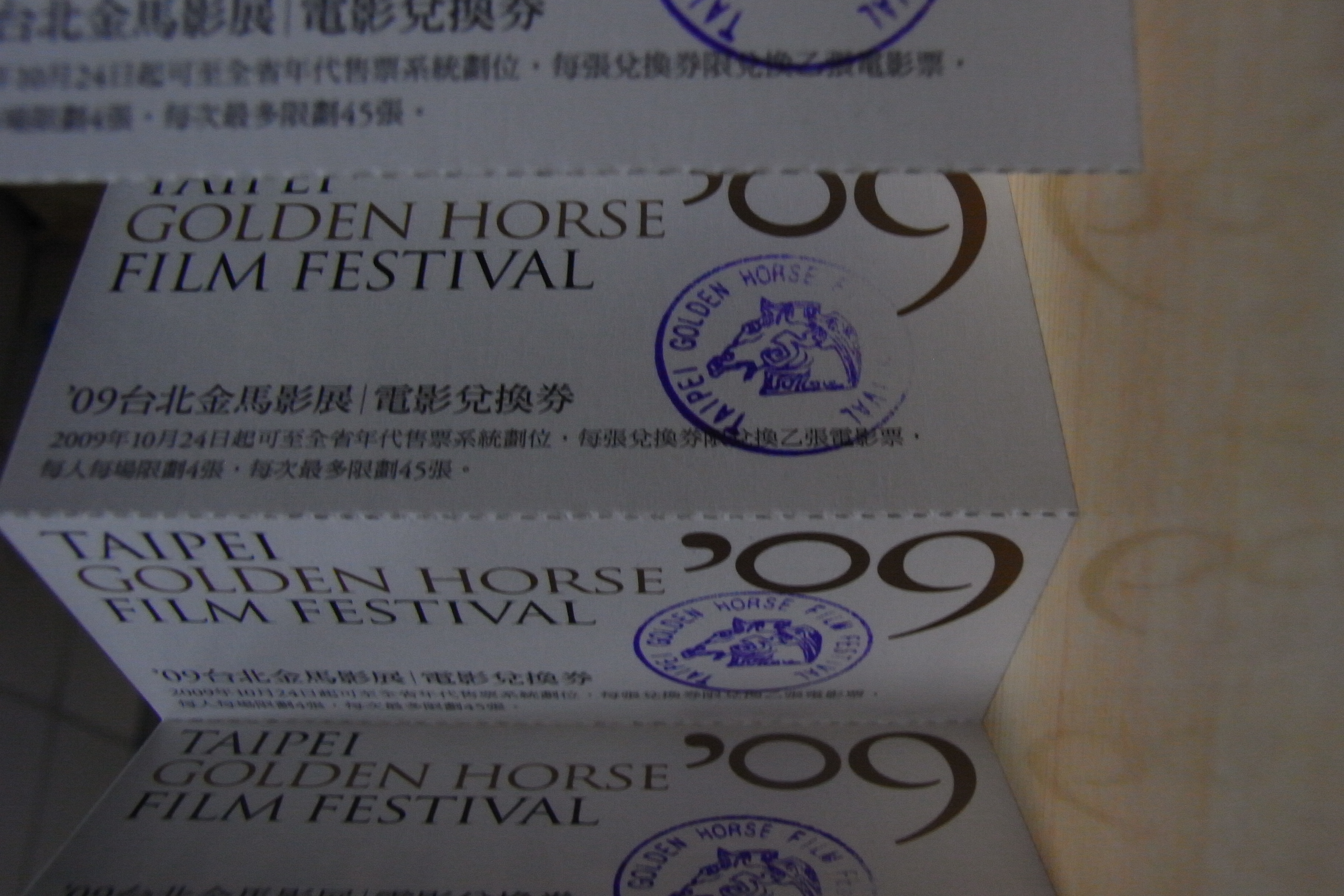 2009台北金馬影展電影兌換券。